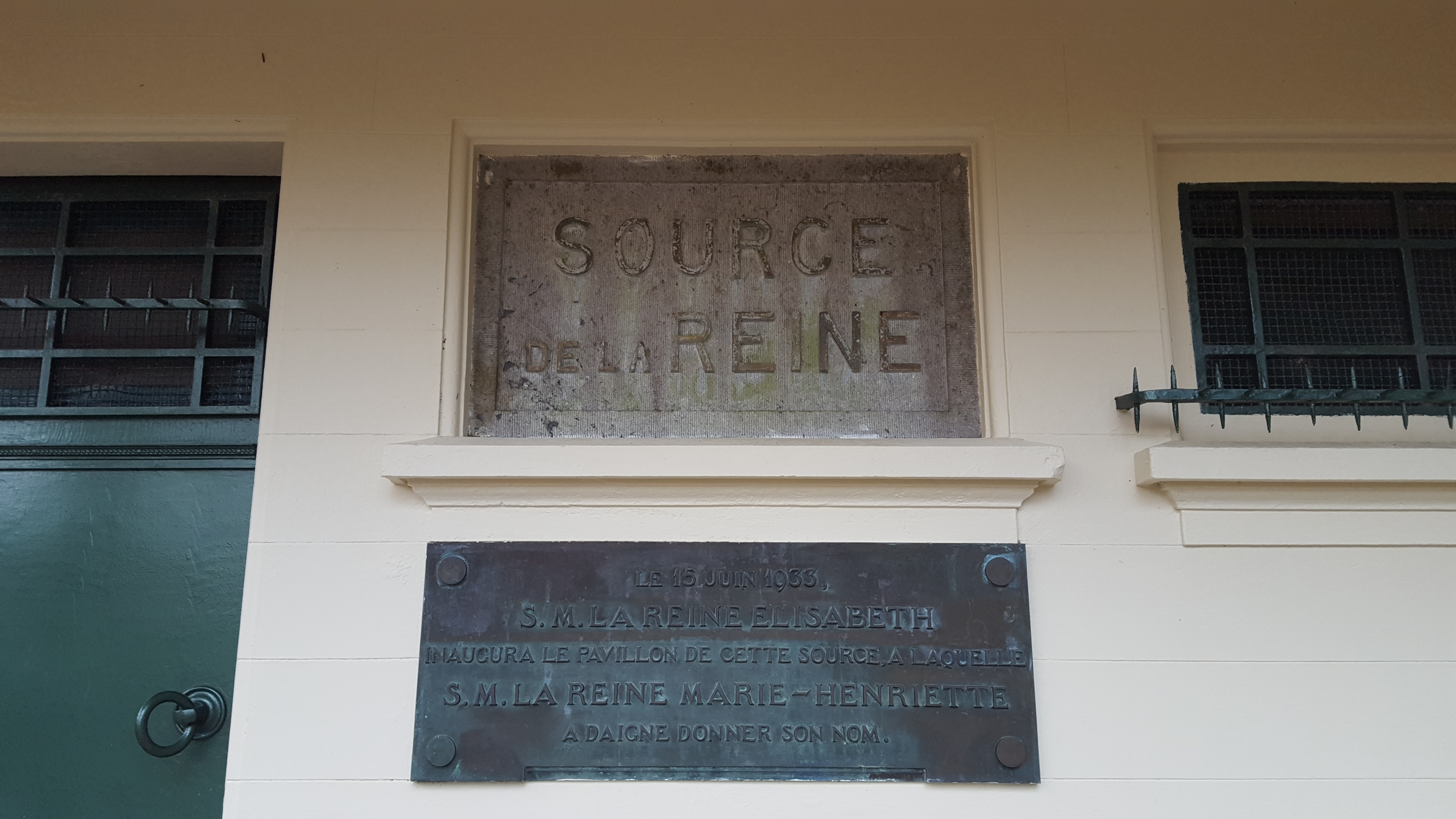 Source de la Reine, Spa, Belgique